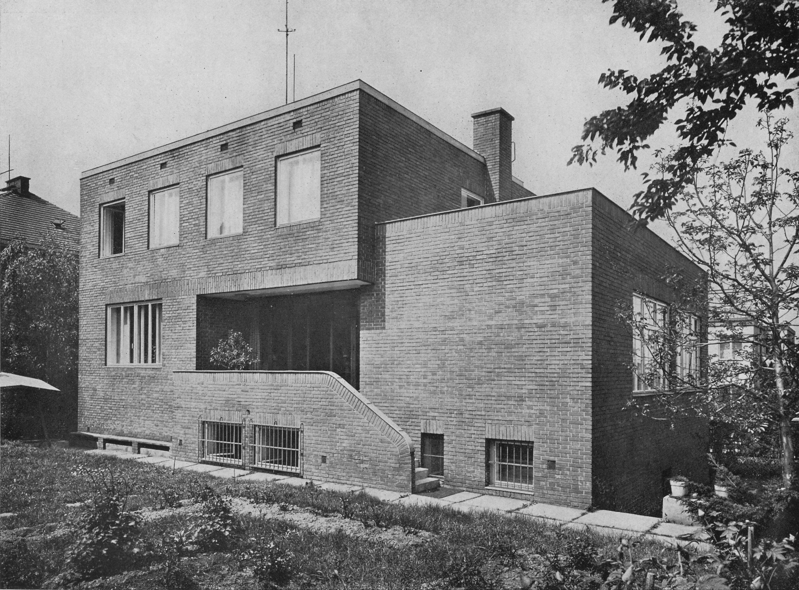 Otakar Novotný: vila malíře Václava Špály, Praha 6 - Střešovice, čp. 755 Na Dračkách 5. Původní stav.